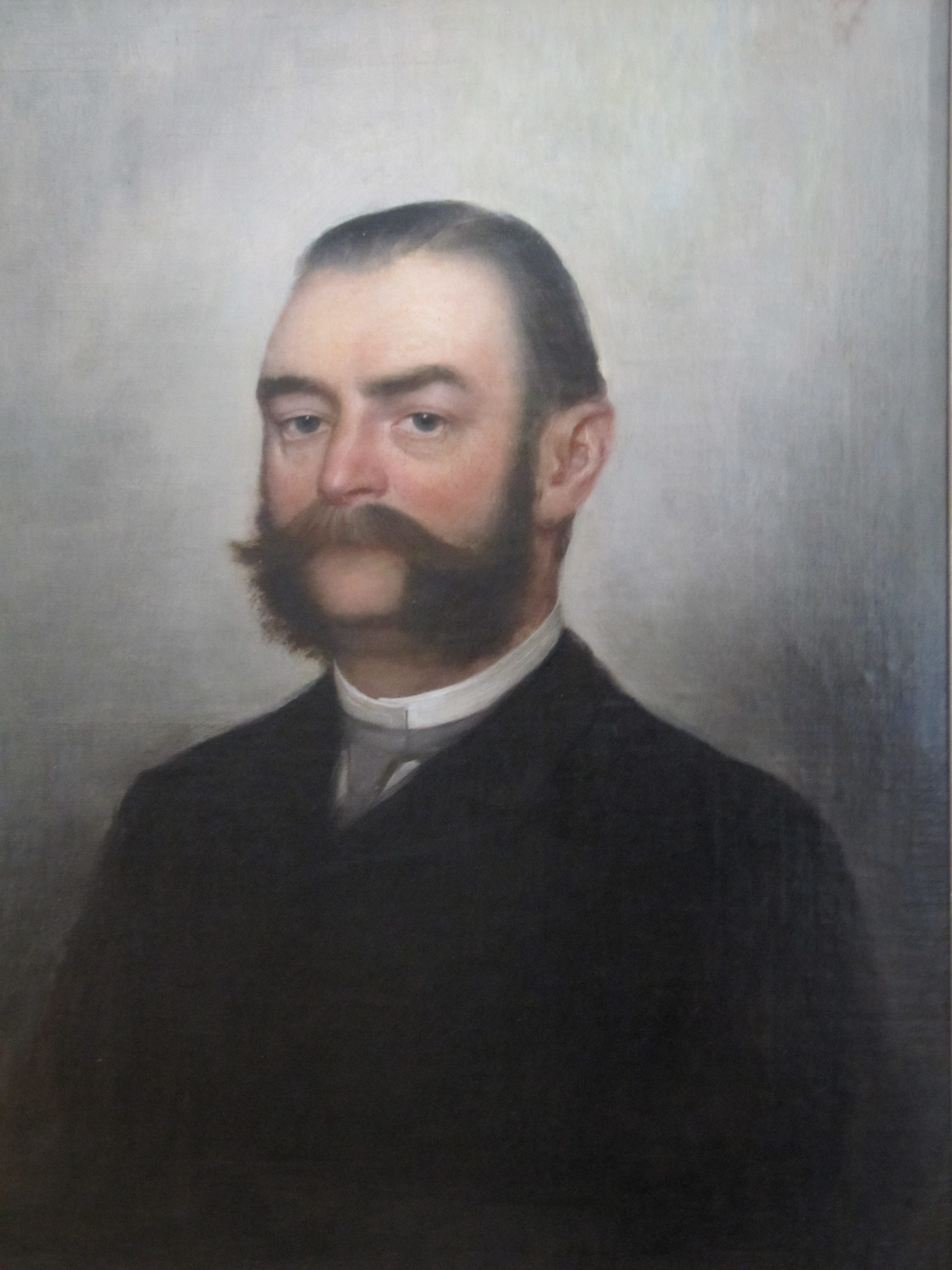 Portrait of Eduard Zais, painted by Schultz-Norwegen 1887